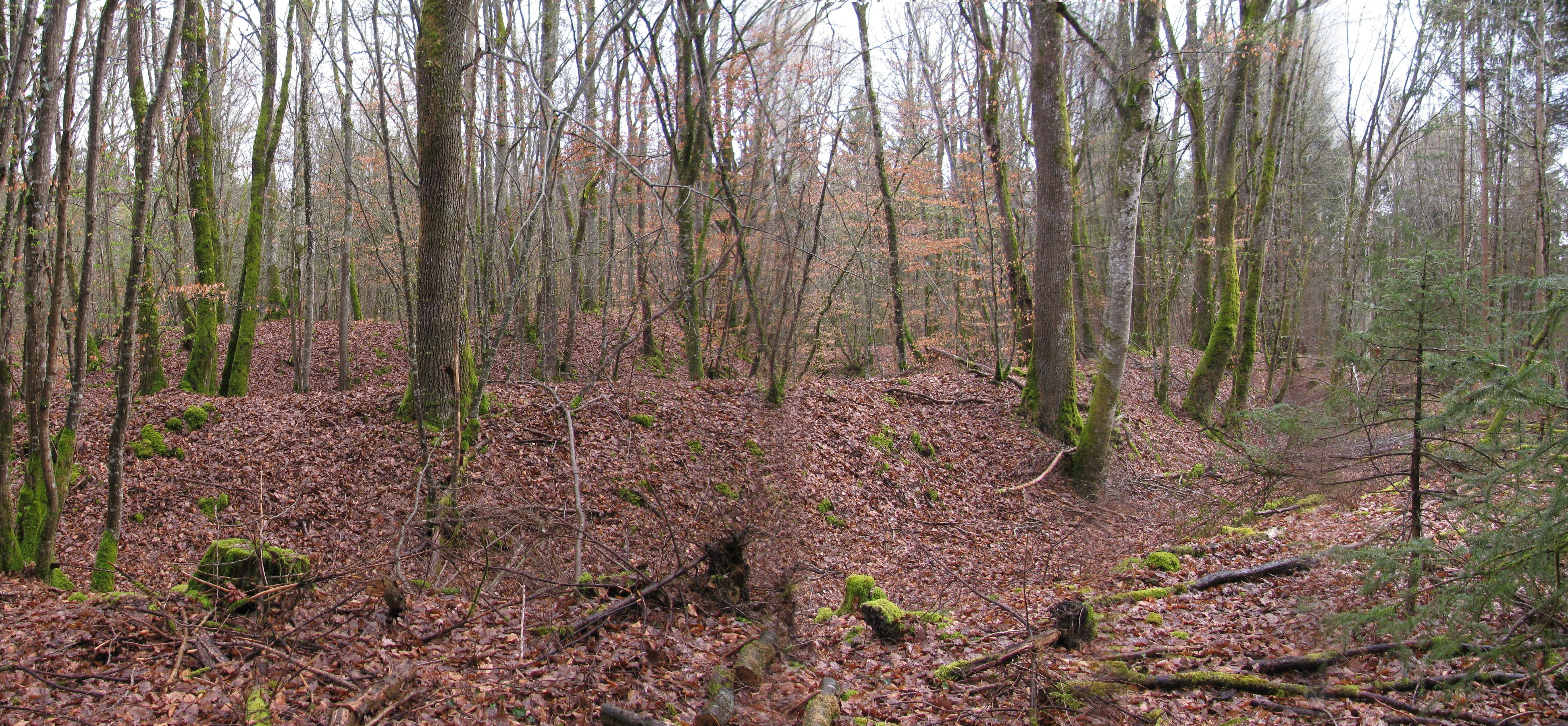 "oppidum" en forêt de Chabet, commune d'Azy-le-Vif, Nièvre, France.